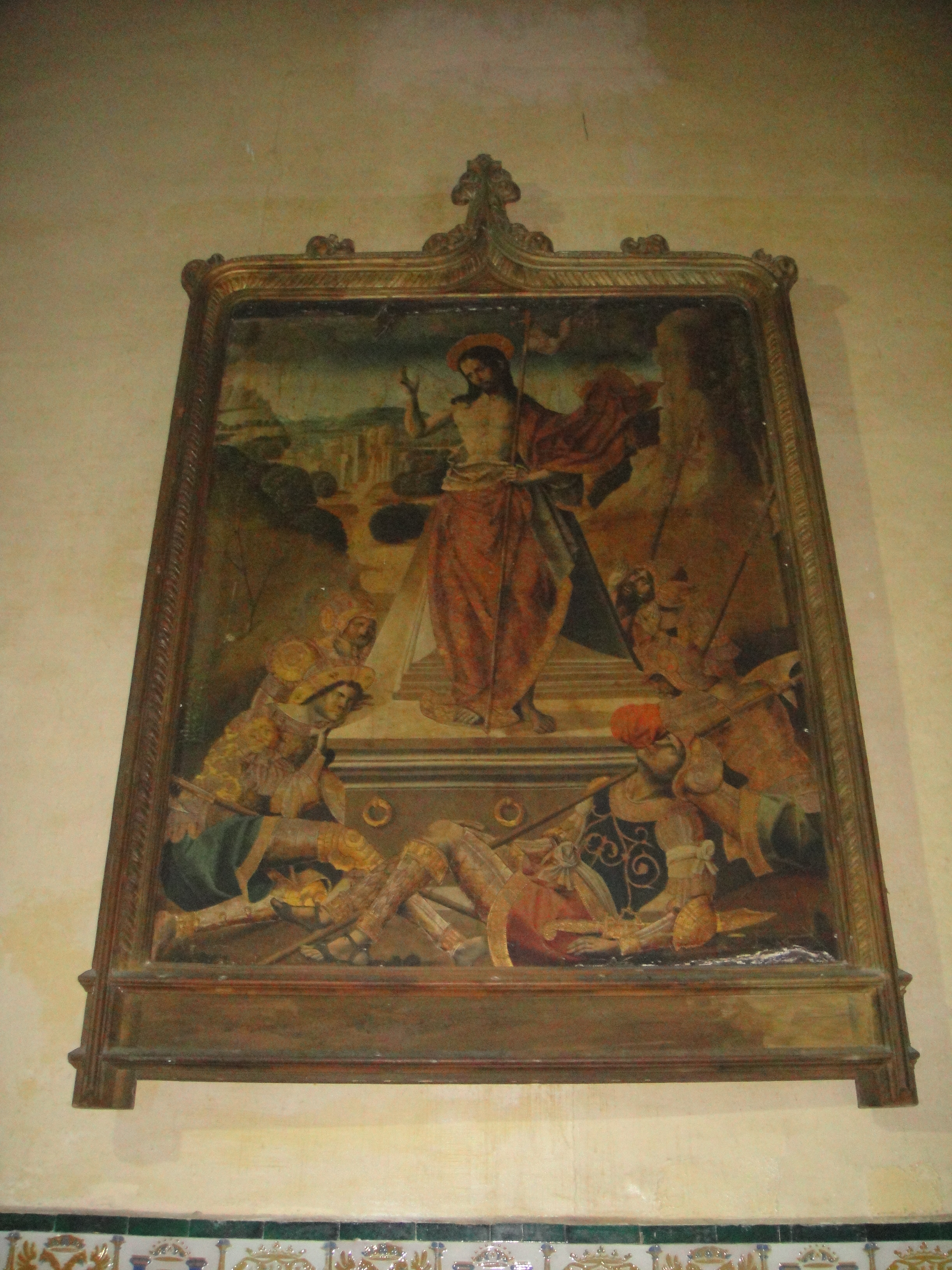 Lienzo que representa la Resurreción de Cristo. Capilla del Sagrario de la iglesia de Nuestra Señora del Castillo de Fuente Obejuna, provincia de Córdoba, (España).